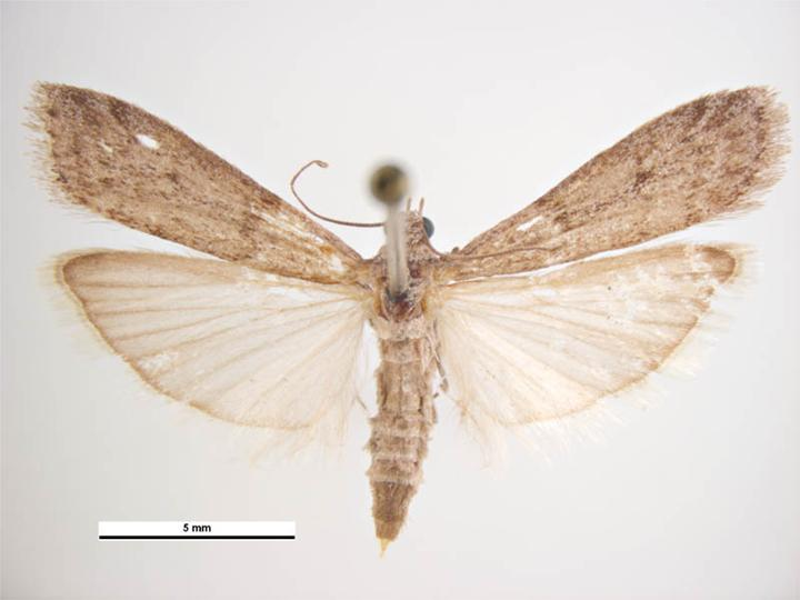 Ephestia kuehniella female, dorsal view